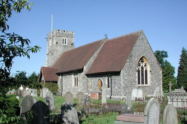 St Margaret, Ridge, Herts